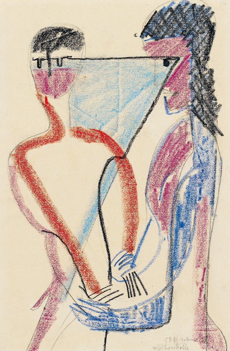 Selbstkontrolle. 1928. Bleistift und Farbkreiden auf Velin. 43,2 x 28,4 cm. Signiert, datiert und betitelt unten rechts: E L Kirchner 28 / Selbstkontrolle. Auf der Rückseite bezeichnet: 08 2306/14 579